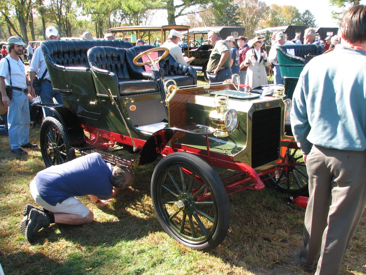 1905 Reo automobile